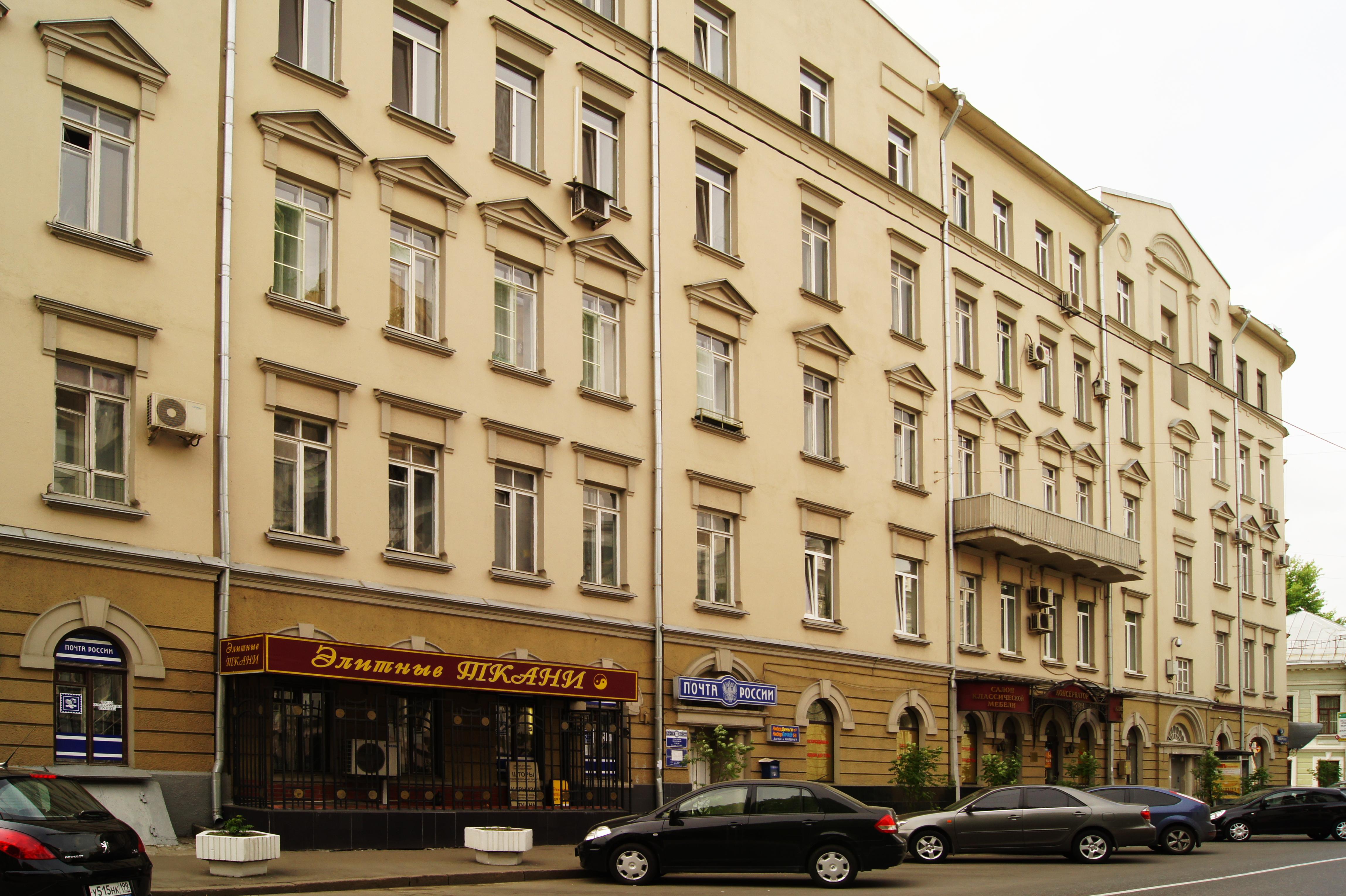 Povarskaya Street 29-Trubnikovsky Lane 36